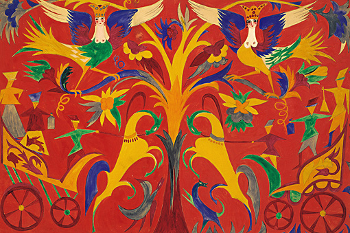 Н.С. Гончарова. Эскиз занавеса к балету «Свадебка» Неосуществленный вариант. Конец 1910-х В